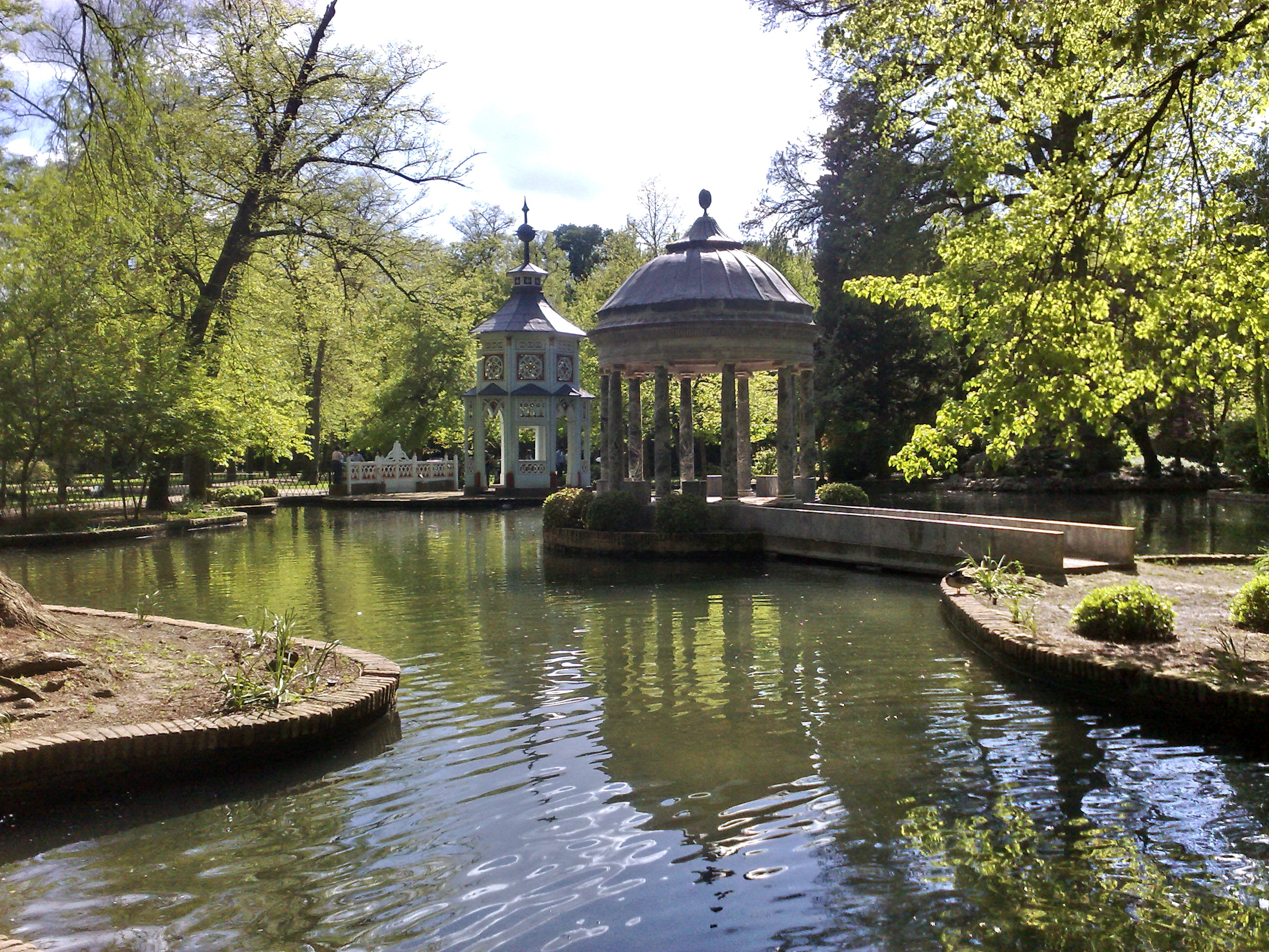 Lago en los jardines de Aranjuez